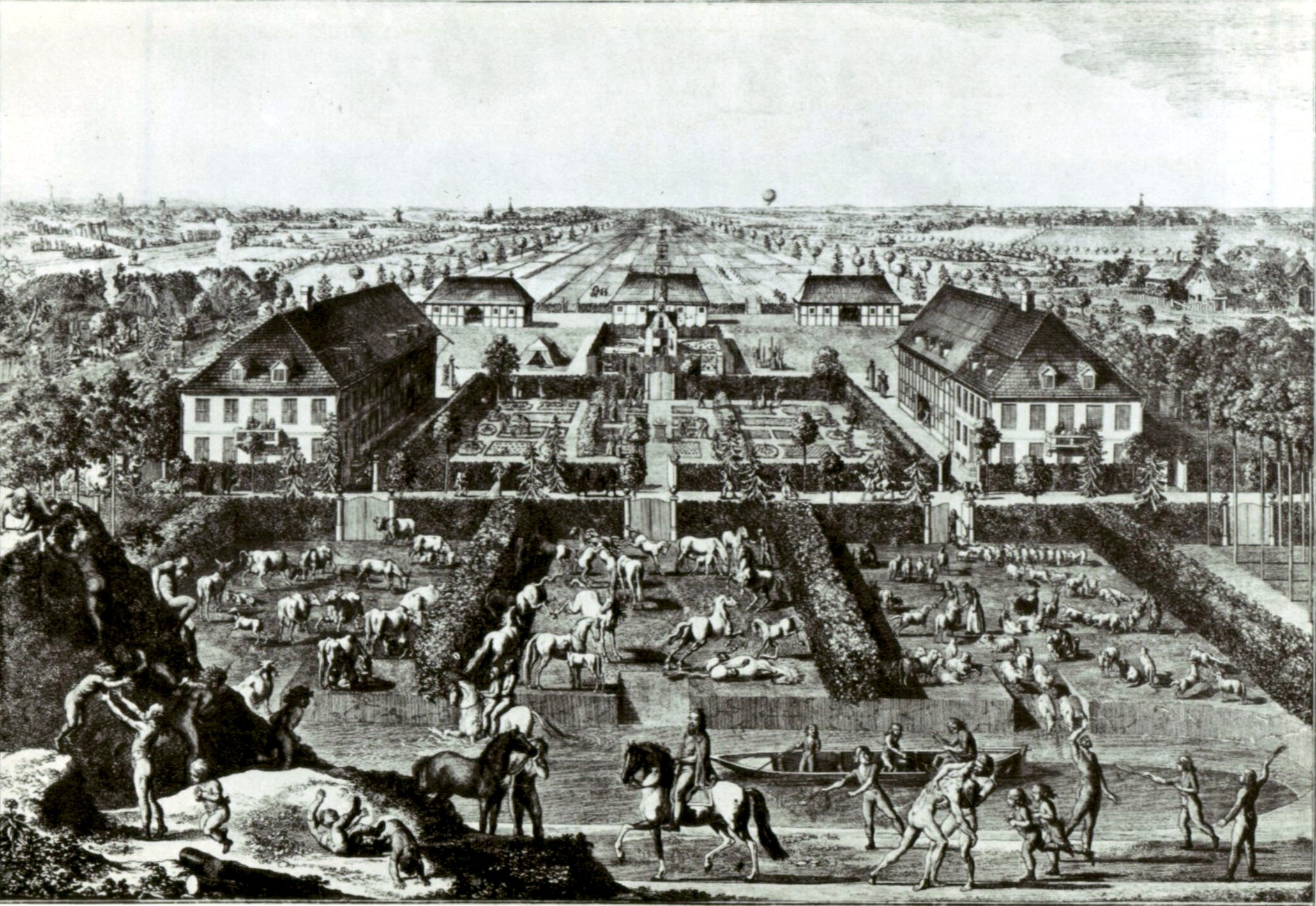 Idealansicht der Erziehungsanstalt von Joachim Heinrich Campe am Hammer Deich 1777-83, Radierung von Daniel Chodowiecki